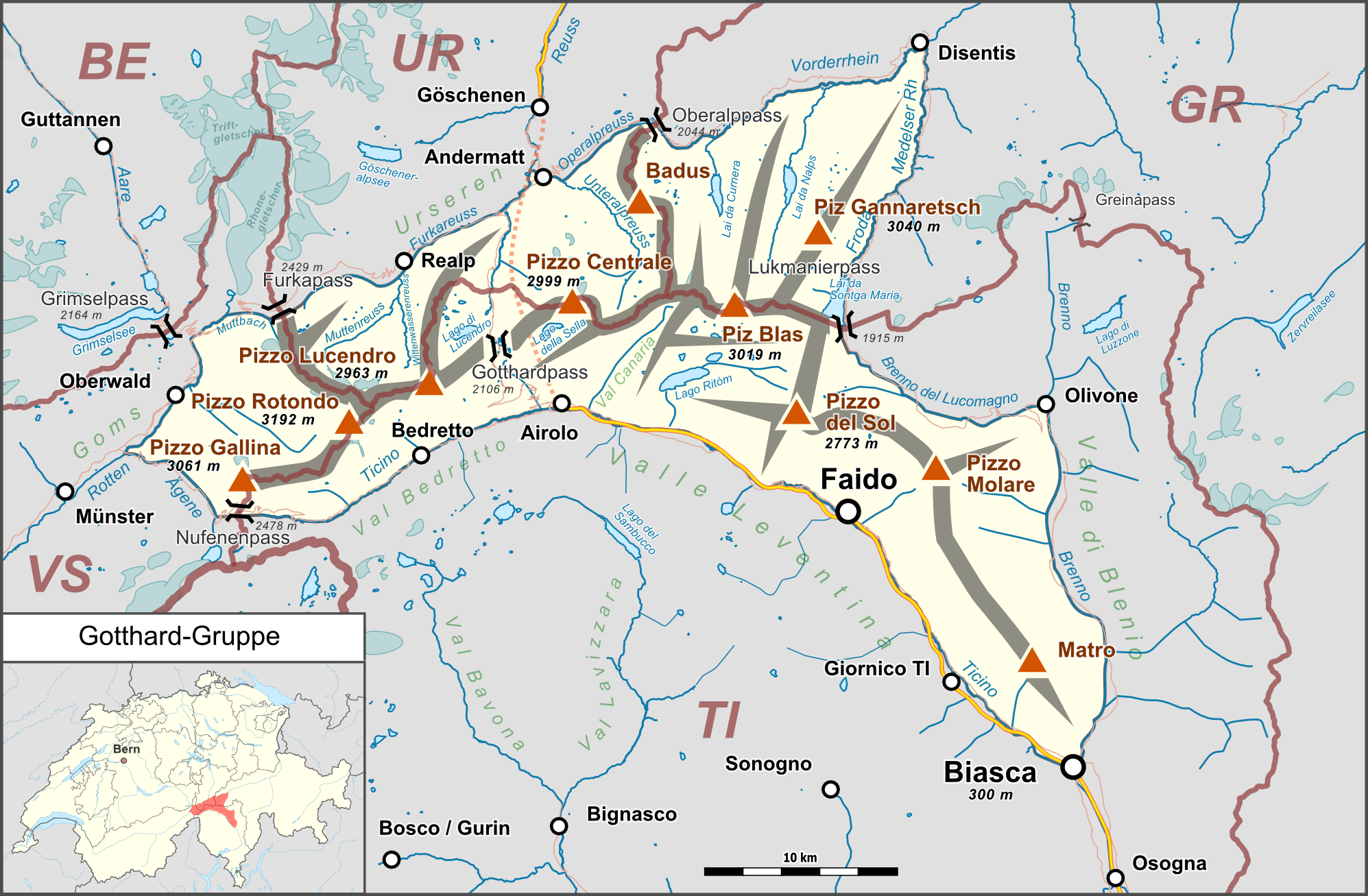 Lagekarte der Gotthard-Gruppe